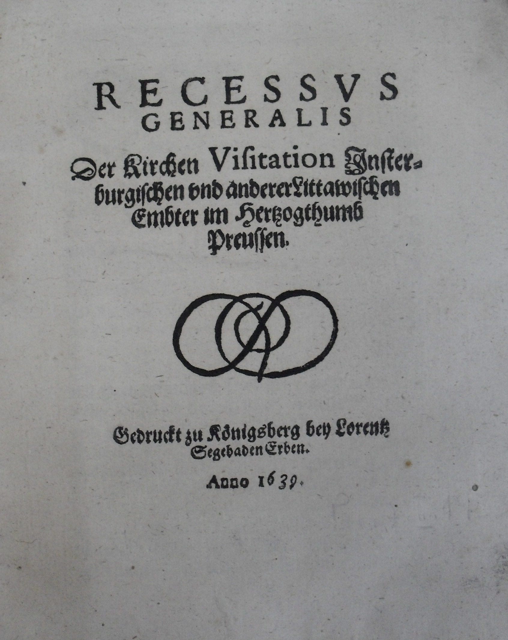 Recessus generalis der Kirchen Visitation Insterburgischen und anderer Littawischen Embter im Hertzogthumb Preussen, Königsberg: bey Lorentz Segebaden Erben, 1639. Zbiory Biblioteki Uniwersyteckiej w Toruniu, sygnatura Pol.7.II.1433.